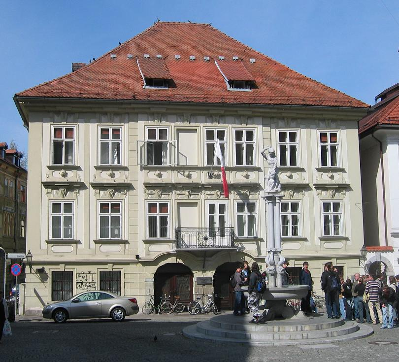 Stična mansion, Stari trg 34, Ljubljana (now Music Academy) author: Ziga 14:17, 25 April 2006 (UTC)